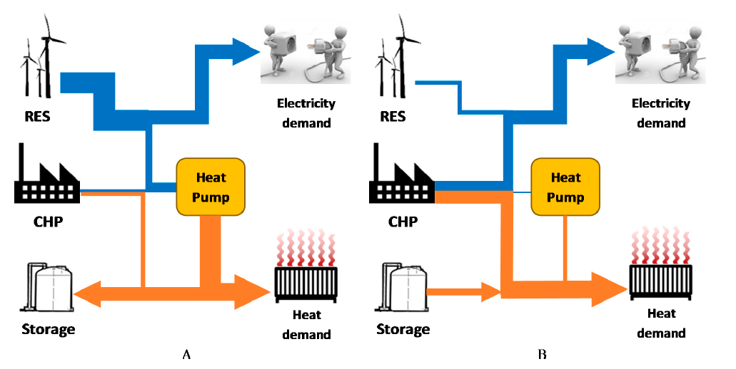 Flexibilitätspotentiale durch Wärmepumpen, BHKWs und Wärmespeicher